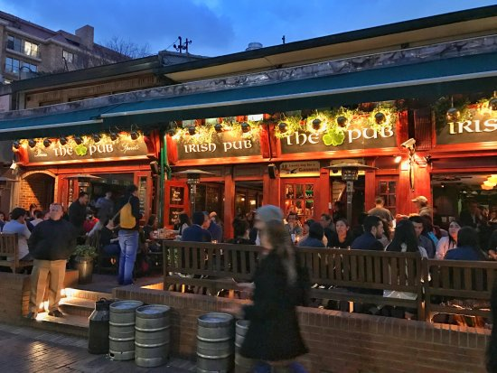 Un pub irlandés en bogota